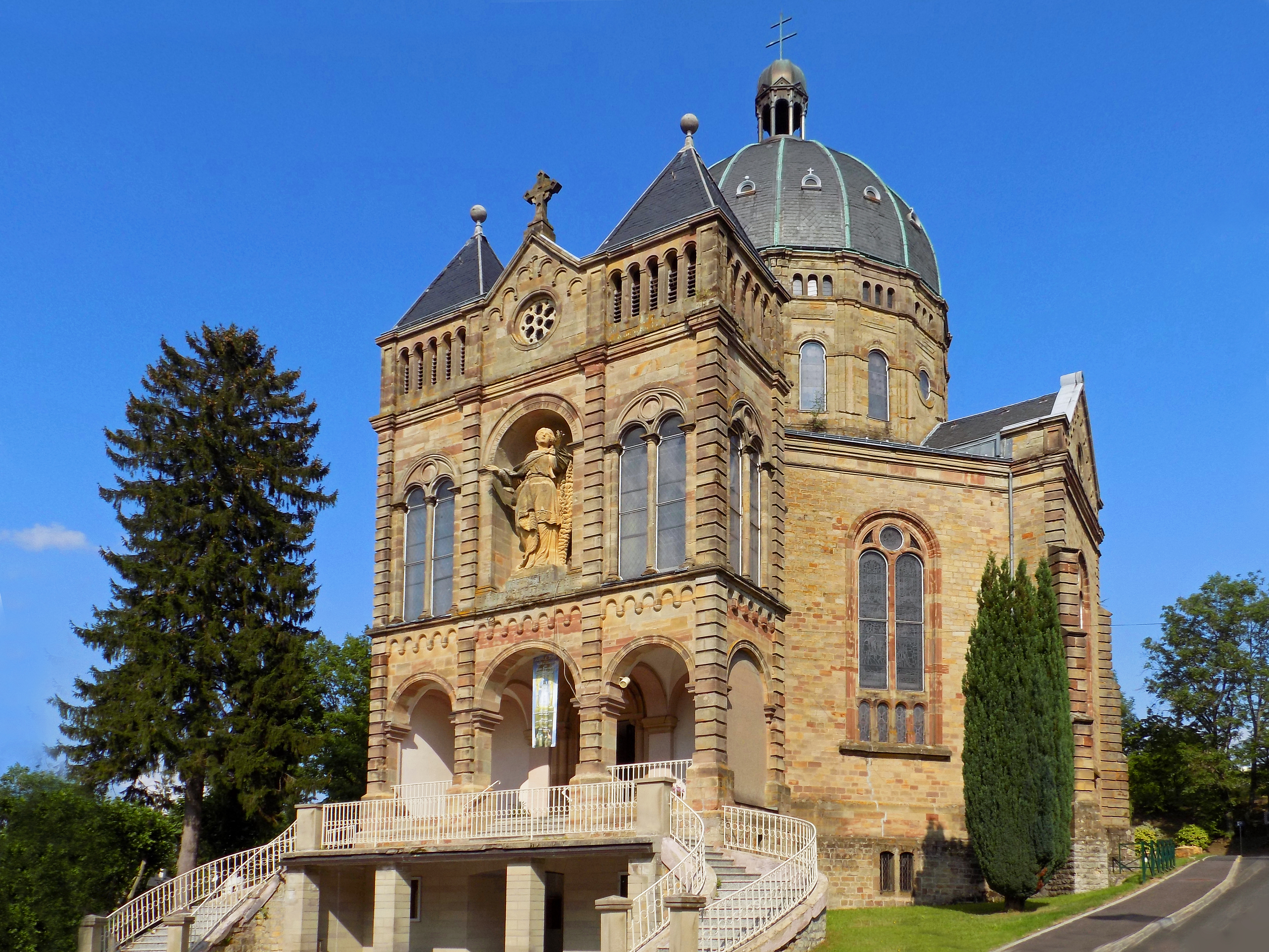 Basilique Notre-Dame-de-Bon-Secours de Saint-Avold, basilique mineure. Sanctuaire fondé au XVIe siècle et dédié à Notre-Dame-de-Bon-Secours. Pèlerinage marial. Vue de la façade avec statue baroque de la Vierge Marie sculptée par Pierre-François Le Roy.